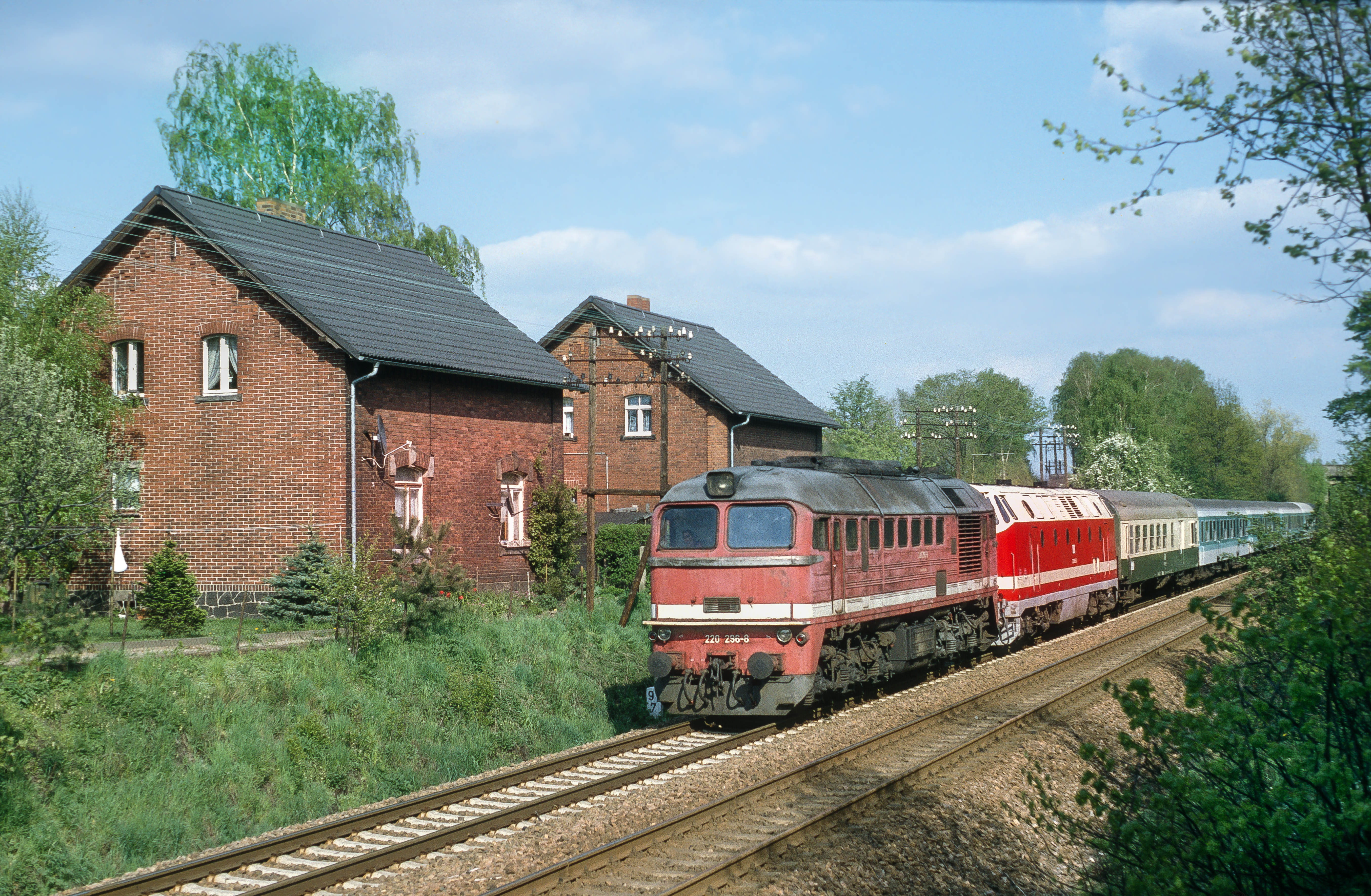 Zug bei Langebrück